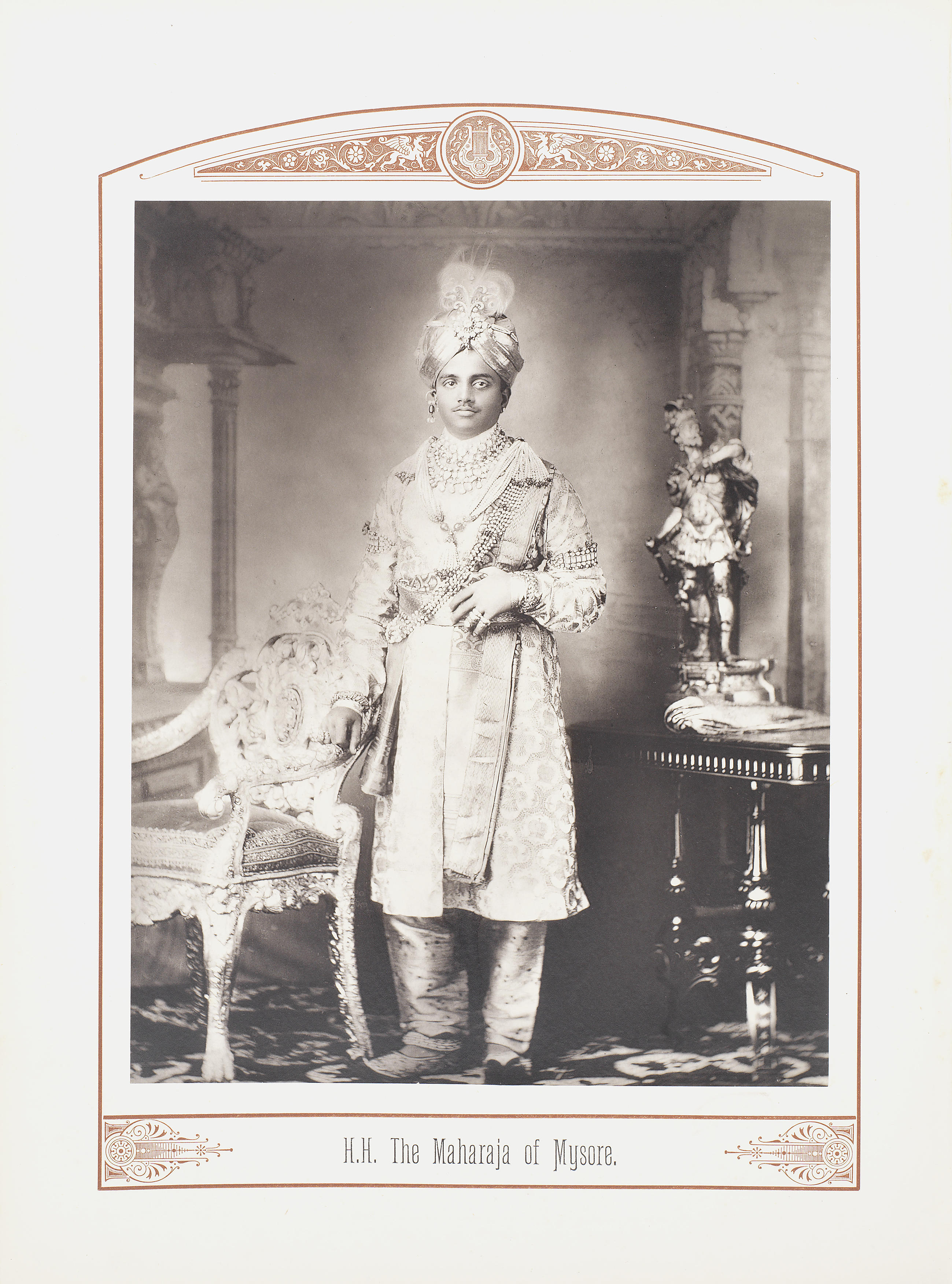 Maharaja Sri Krishna Raja Wadiyar IV (Nalwadi Krishna Raja Wadiyar) GCSI, GBE (June 4, 1884 – August 3, 1940)